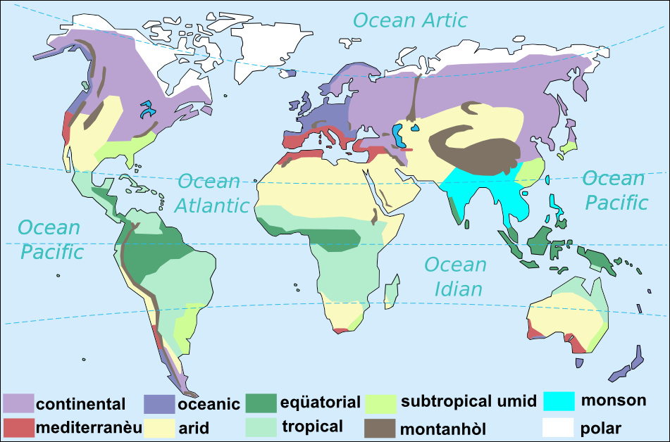 Mapa dels climas dels monde